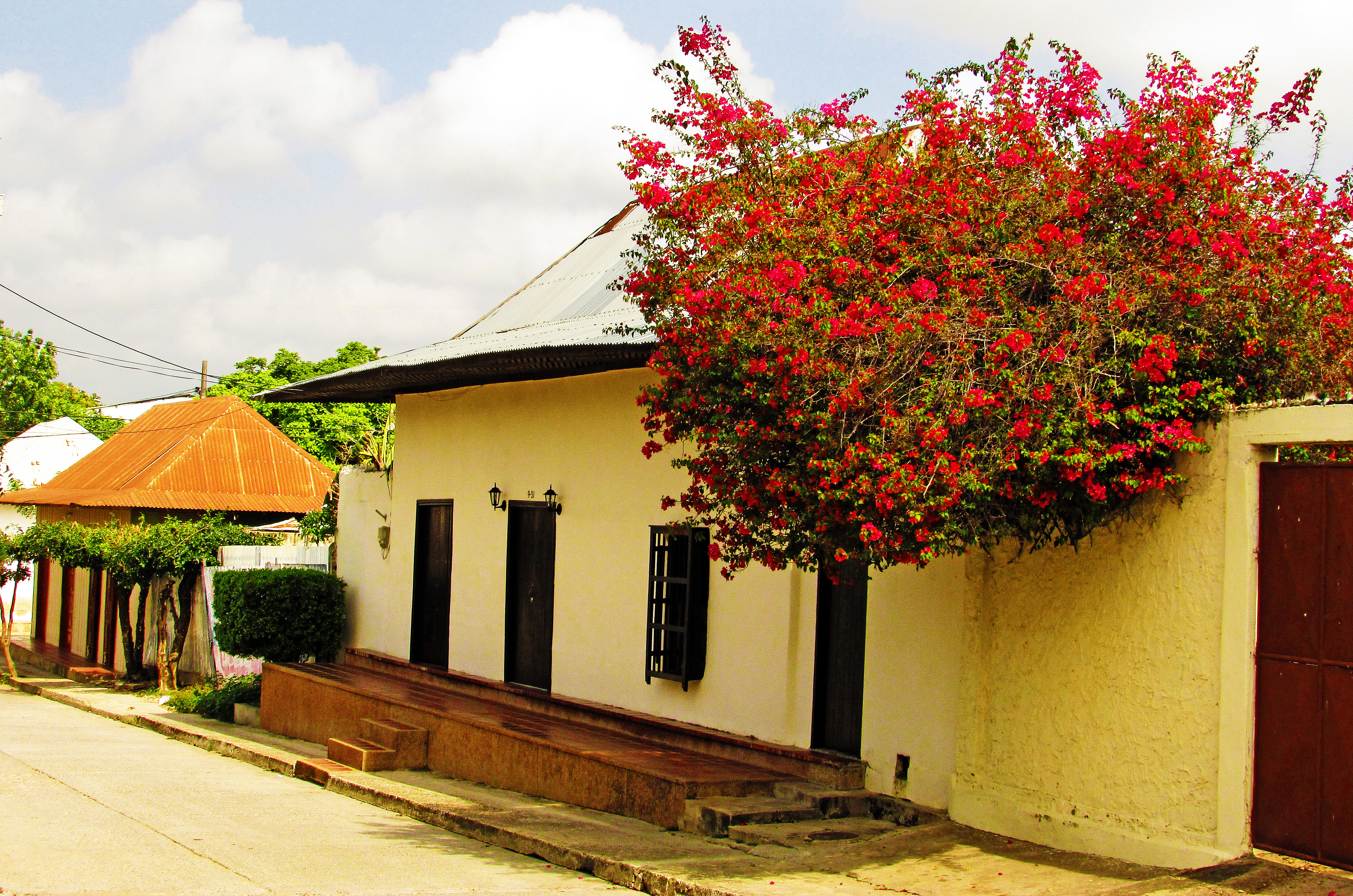 Sincé ofrece una variedad de casas sabaneras inspiradas en el realismo mágico de Gabriel García Márquez, Esta fotografía fue tomada en el municipio colombiano con código 70742.